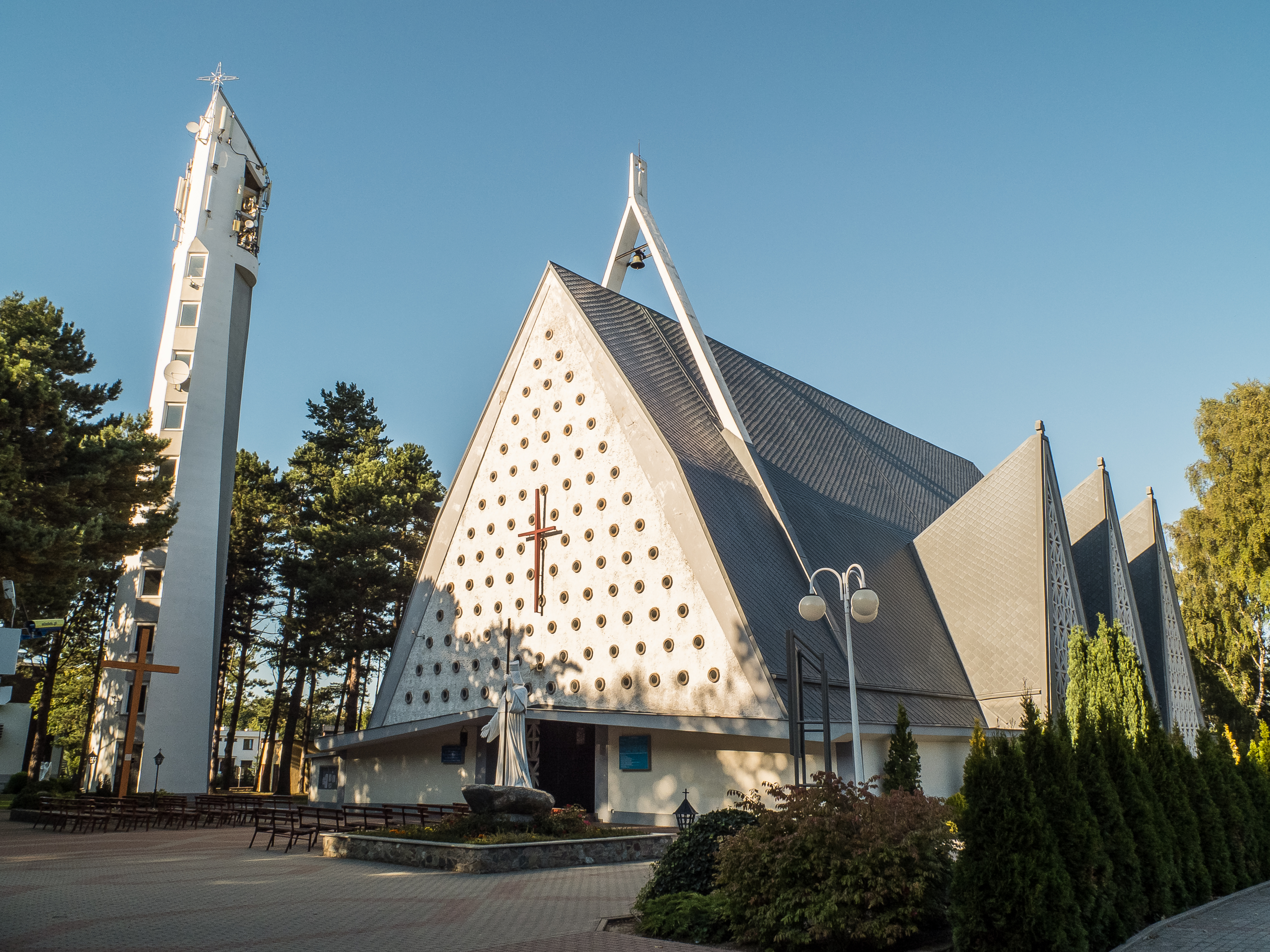 Władysławowo, kościół par. p.w. Wniebowzięcia NMP, 1932-1936, 1957-1961